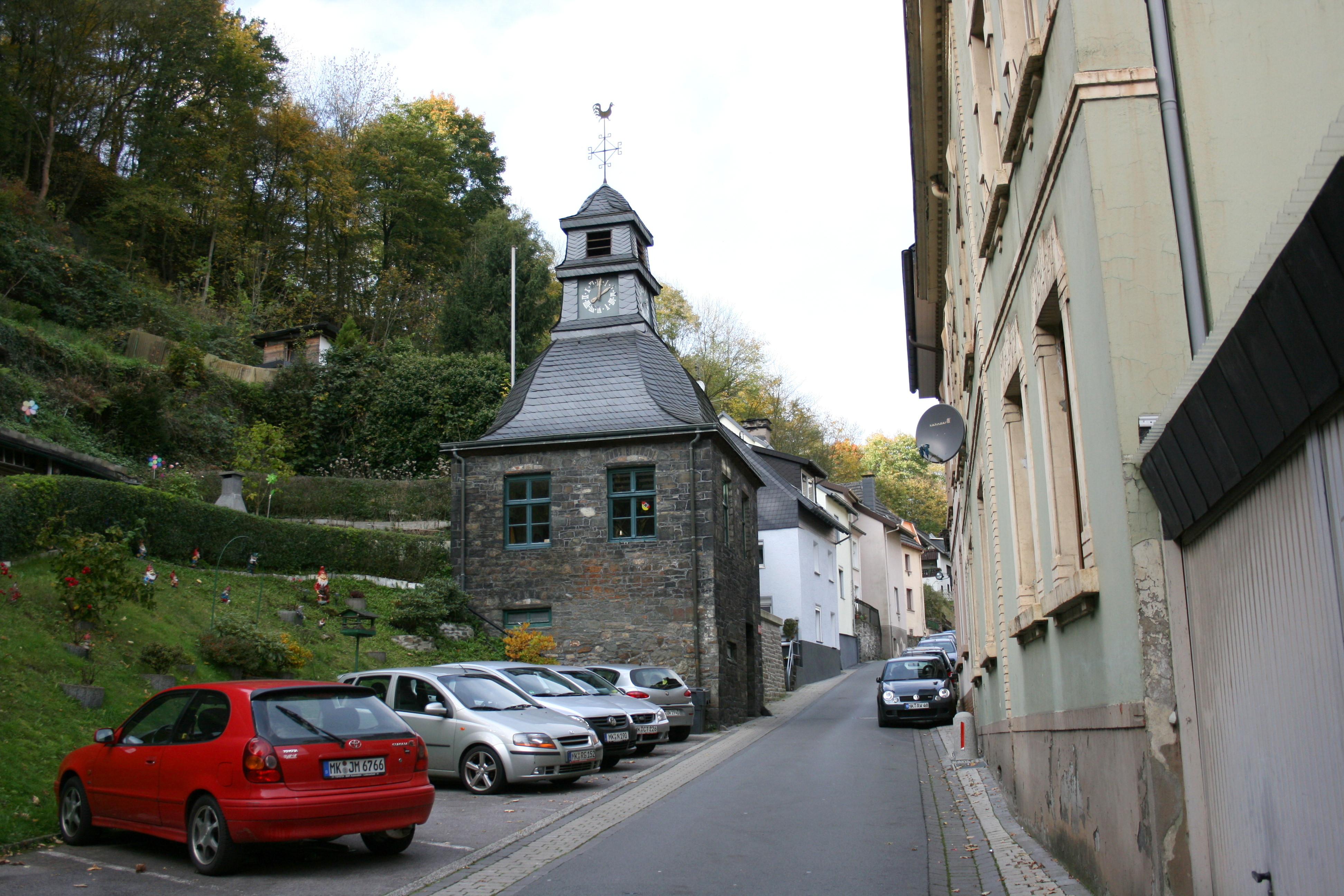 Netter Dömchen in der Klusenstraße in Altena